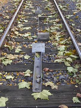 ATB-NG Baken in Raalte, eigen foto